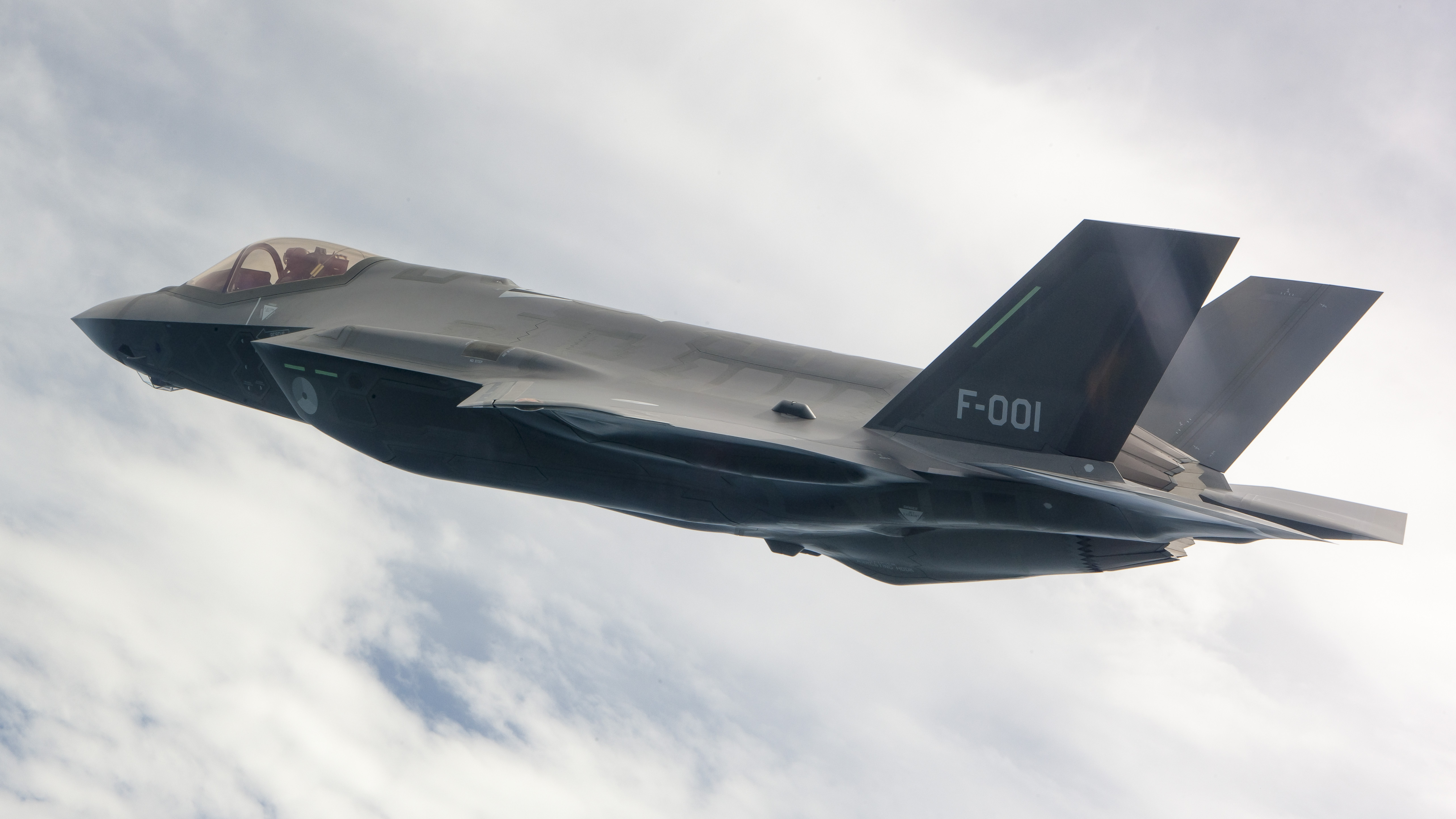 F-35 Lightning II.